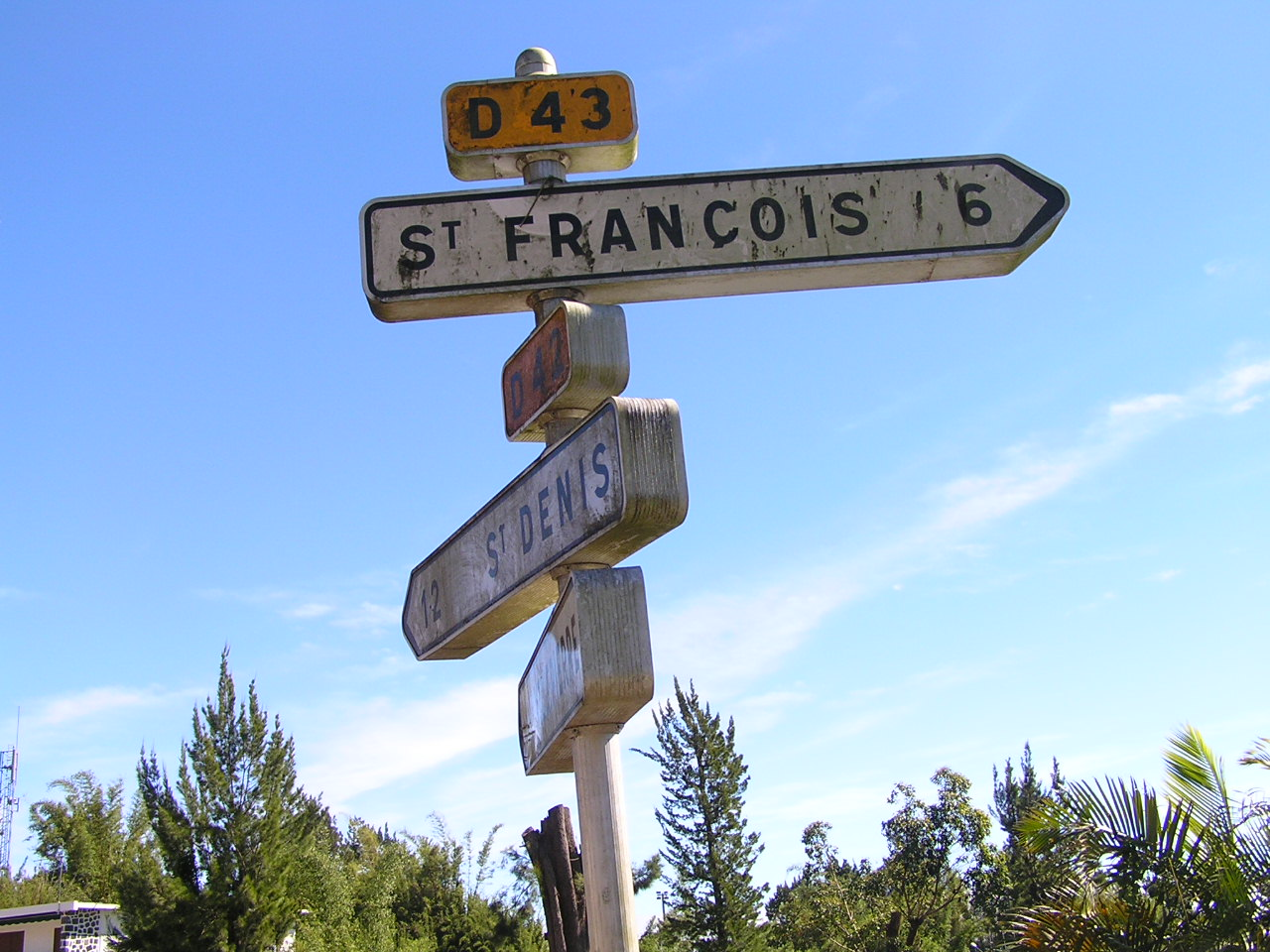 Panneau routier indiquant Saint-François